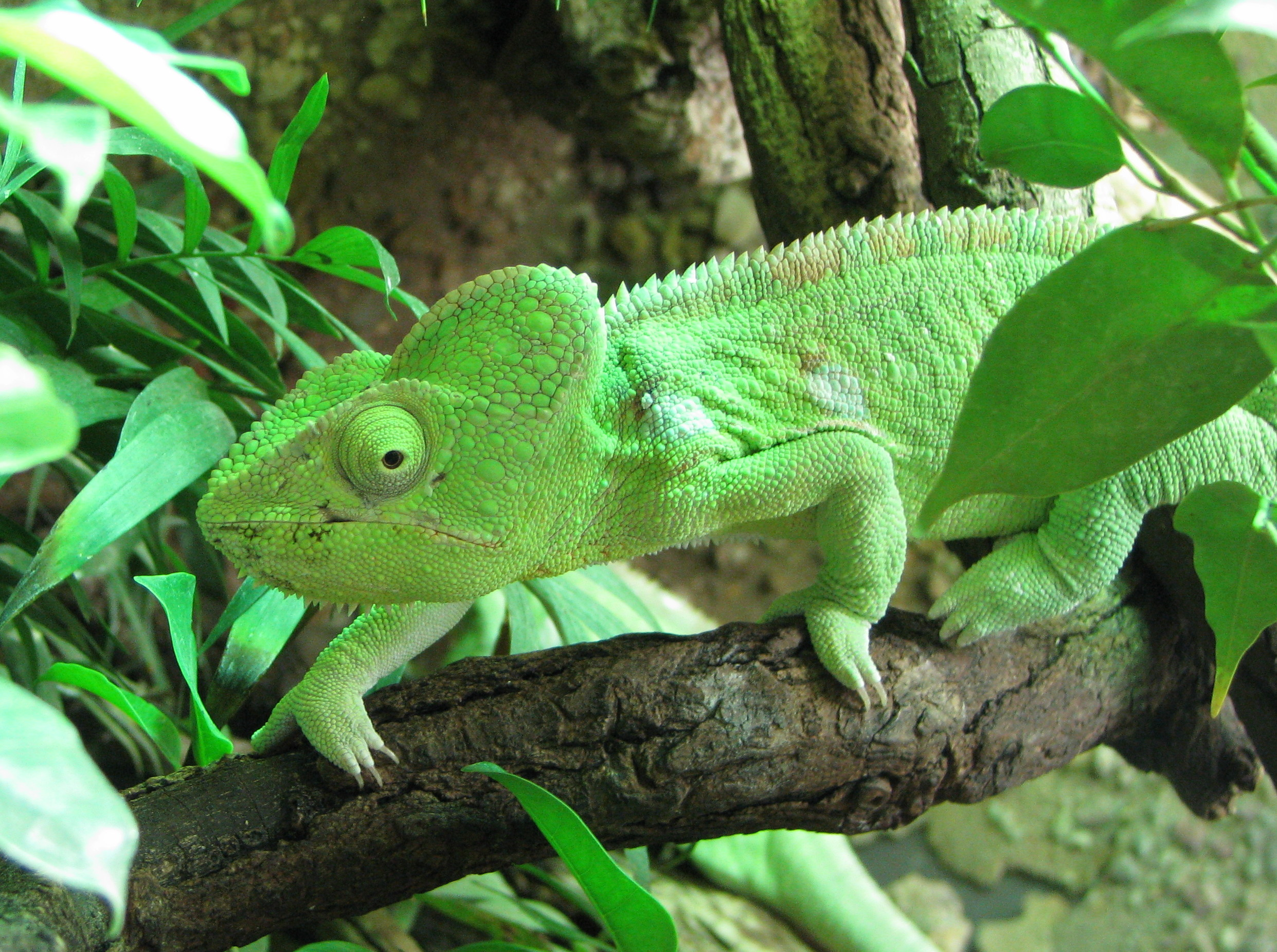 Riesenchamäleon_Weibchen im Prager Zoo